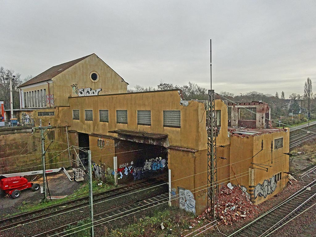 Abrissarbeiten an der Personenbrücke am Bf Wedau.